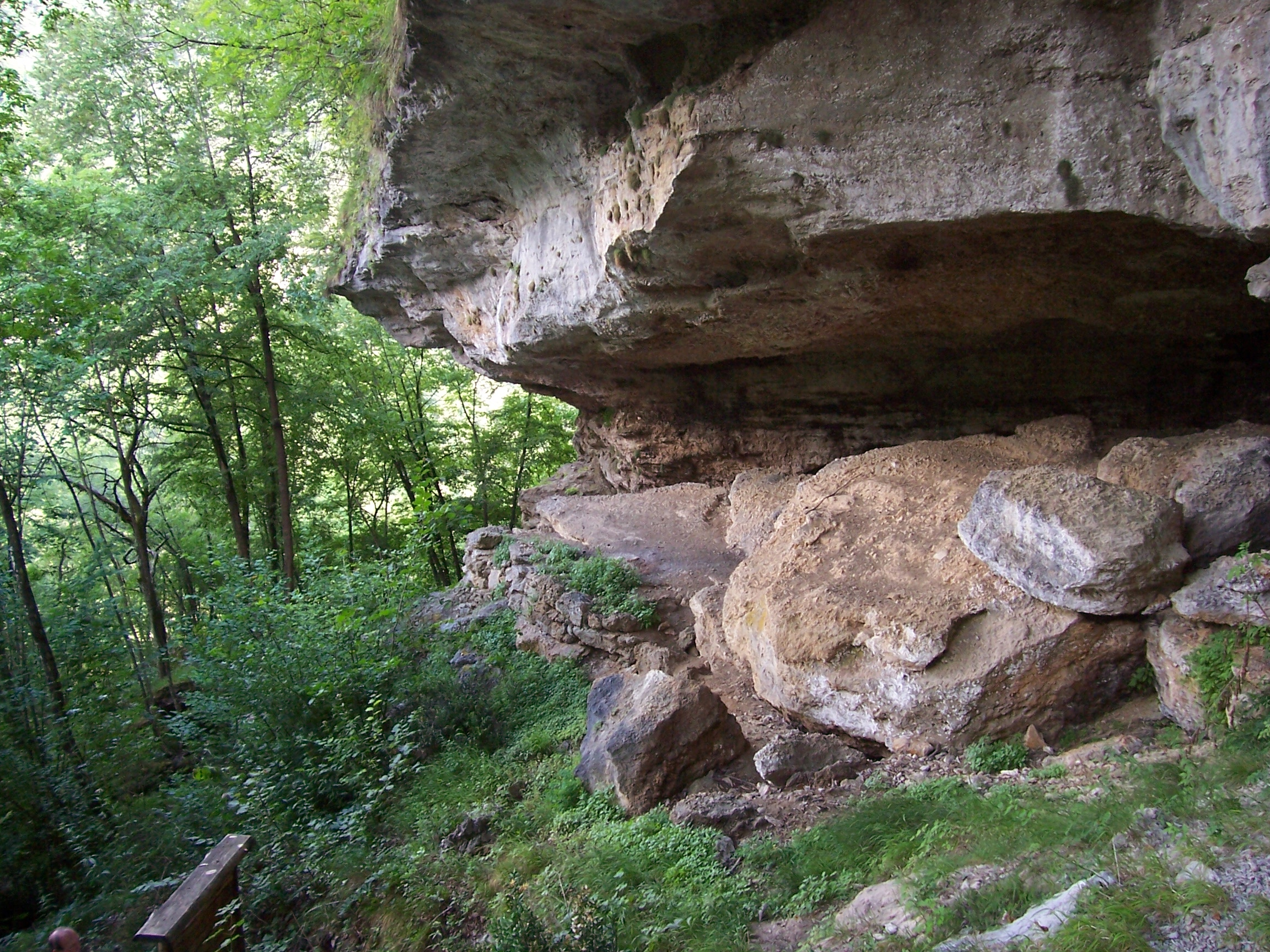 cùel Zanzanù in Valvestino